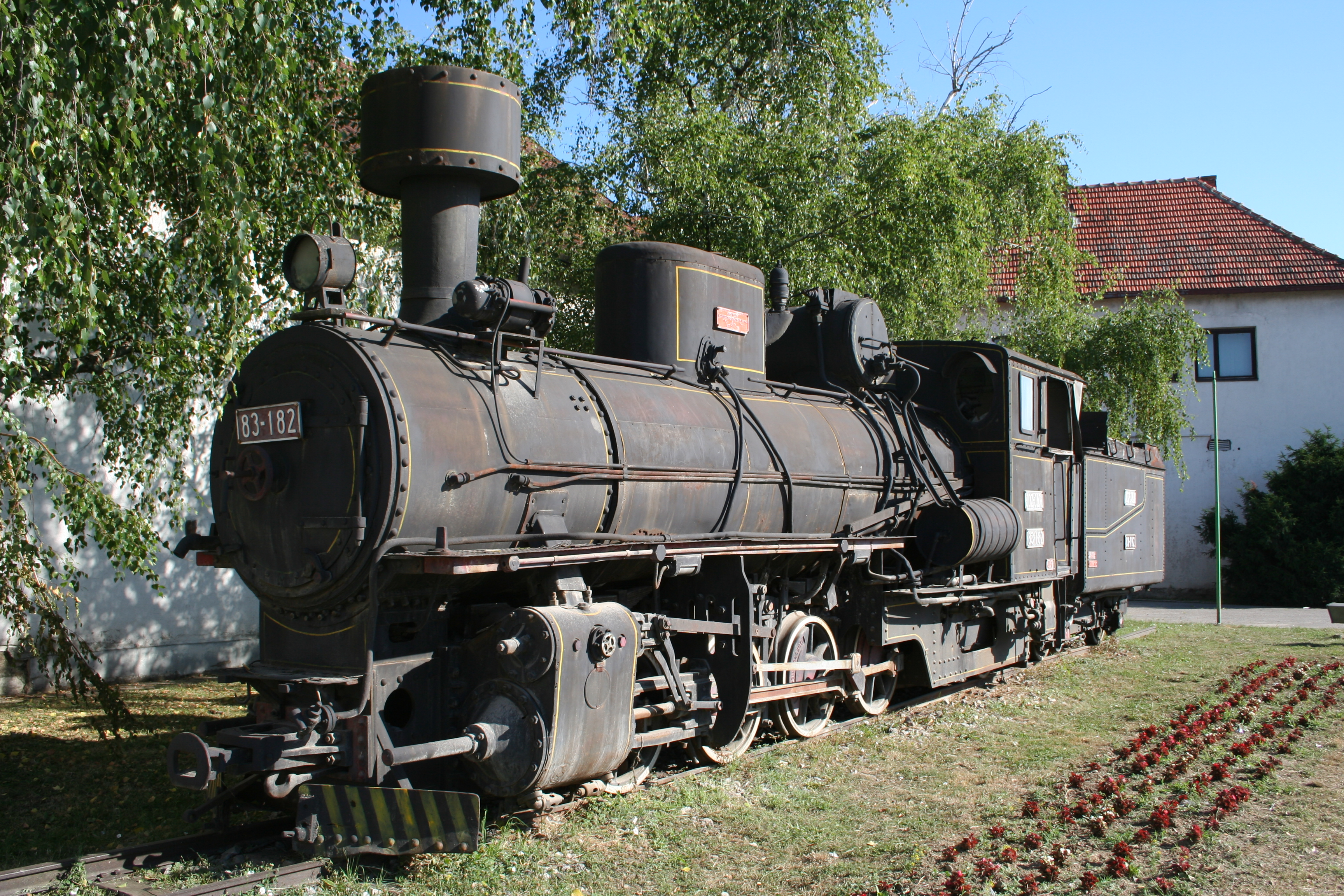 Železnička stanica Lajkovac